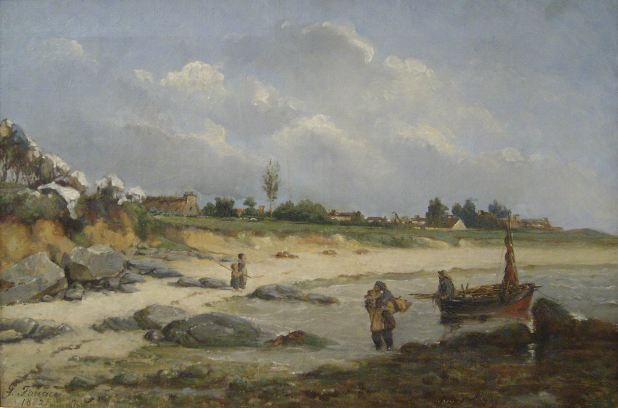 Retour de pêche, Guillaume Fouace, Musée Thomas-Henry, Cherbourg-Octeville